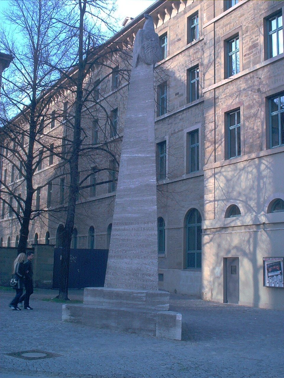 Denkmal für das Infanterieregiment Kaiser Friedrich König von Preußen (7. württ) Nr. 125 Rotebühlplatz in StuttgartInschrift:INFANTERIEREGIMENTKAISER FRIEDRICHKÖNIG VON PREUSSEN 7. WÜRT. No. 125EINHUNDERTZEHN JAHREIM FRIEDEN UND KRIEGUNTER VIER KÖNIGENFURCHTLOS UND TREUIM DIENST DES VATERLANDSBEWÄHRT 1919 AUFGELÖSTSEIN GEIST SOLL FORTLEBEN SEI MIR GEGRÜSSTIM RAUSCHEN DEINER FLÜGELDAS HERZ VERHEISST MIR SIEGIN DEINEM ZEICHENDURCH : EDLER AARDIE WOLKE MUSS DIR WEICHEN FELDZÜGE1809 GEGEN ÖSTERREICH1814-15 GEGEN FRANKREICHBRIENNE MONTEREAUPARIS STRASSBURG1866 GEGEN PREUSSENTAUBERBISCHOFSHEIM1870 - 71 GEGEN FRANKREICHSEDAN VUILLIER CHAMPIGNY1914 18 DER WELTKRIEGFRANKREICH FLANDERN POLENRUSOL SERBIEN ITALIEN